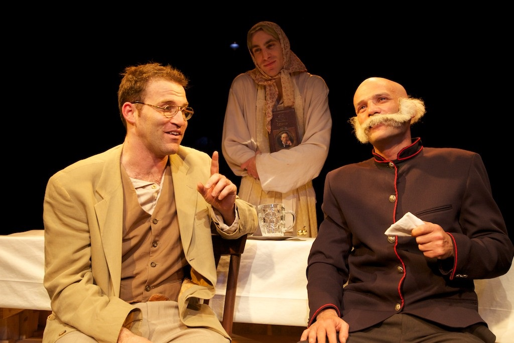 ההצגה "אגף 6", עפ"י אנטון צ'כוב, בבימויו של יפים קוצ'ר, בתיאטרון הסימטה, 2011מימין לשמאל אלון אורבך, גיא אלון, עירד רובינשטיין